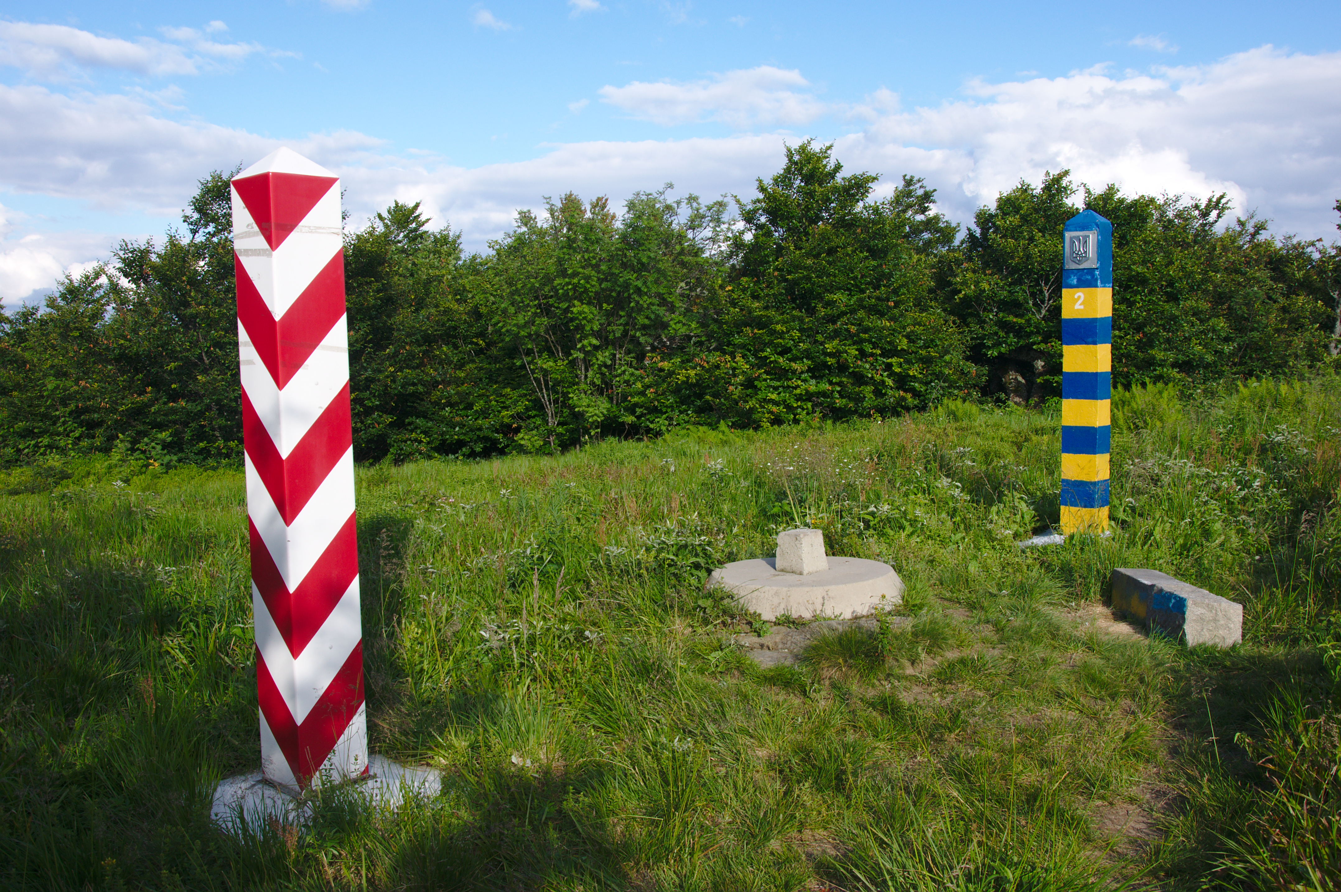 Polsko-Ukrajinská hranice v blízkosti Kremenca